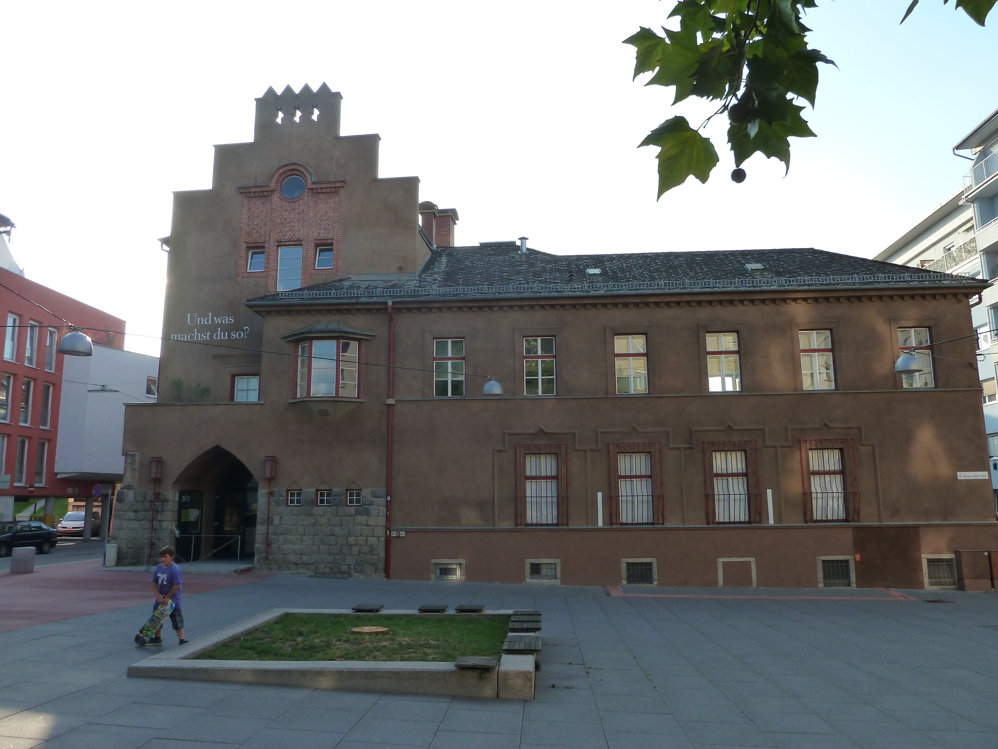 ehemalige Volksküche am Herbert-Bayer-Platz 1, Ecke Eisenbahnergasse 20, Linz Innenstadt